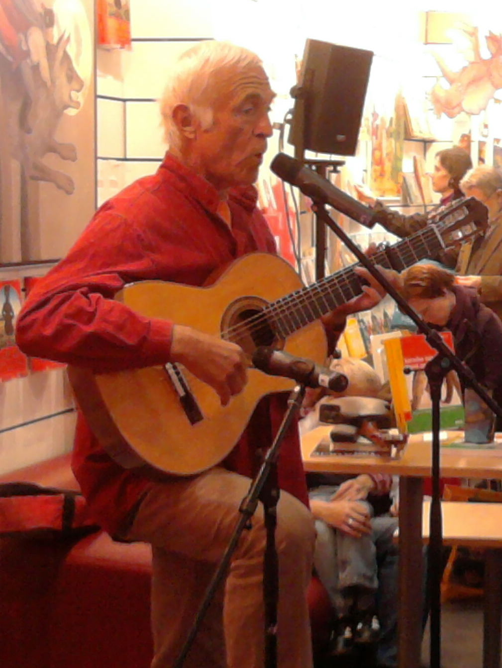 Fredrik Vahle auf der Frankfurter Buchmesse 2010